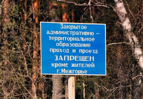 Hinweisschild Meschgorje